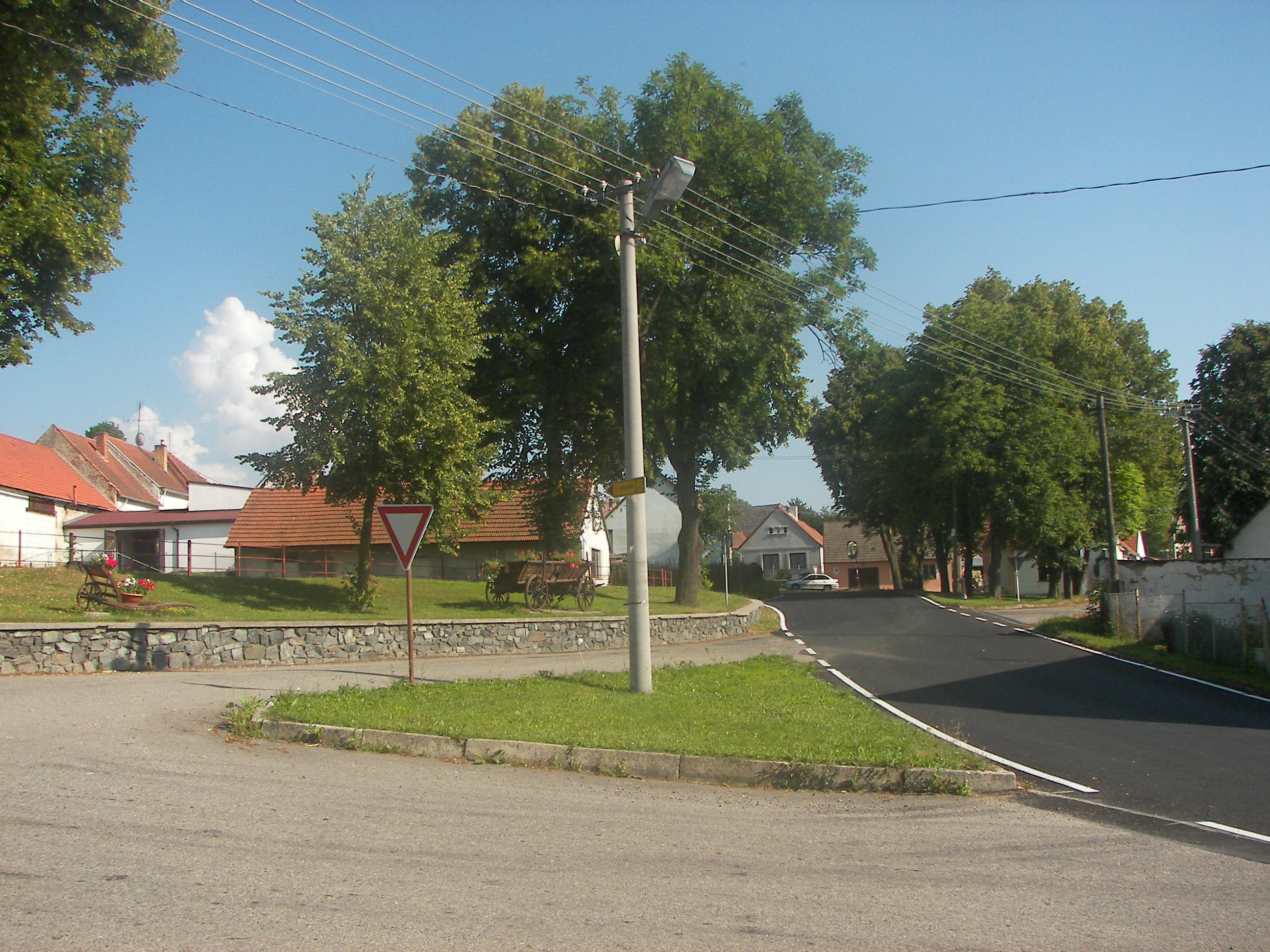 Skopytce - centrum